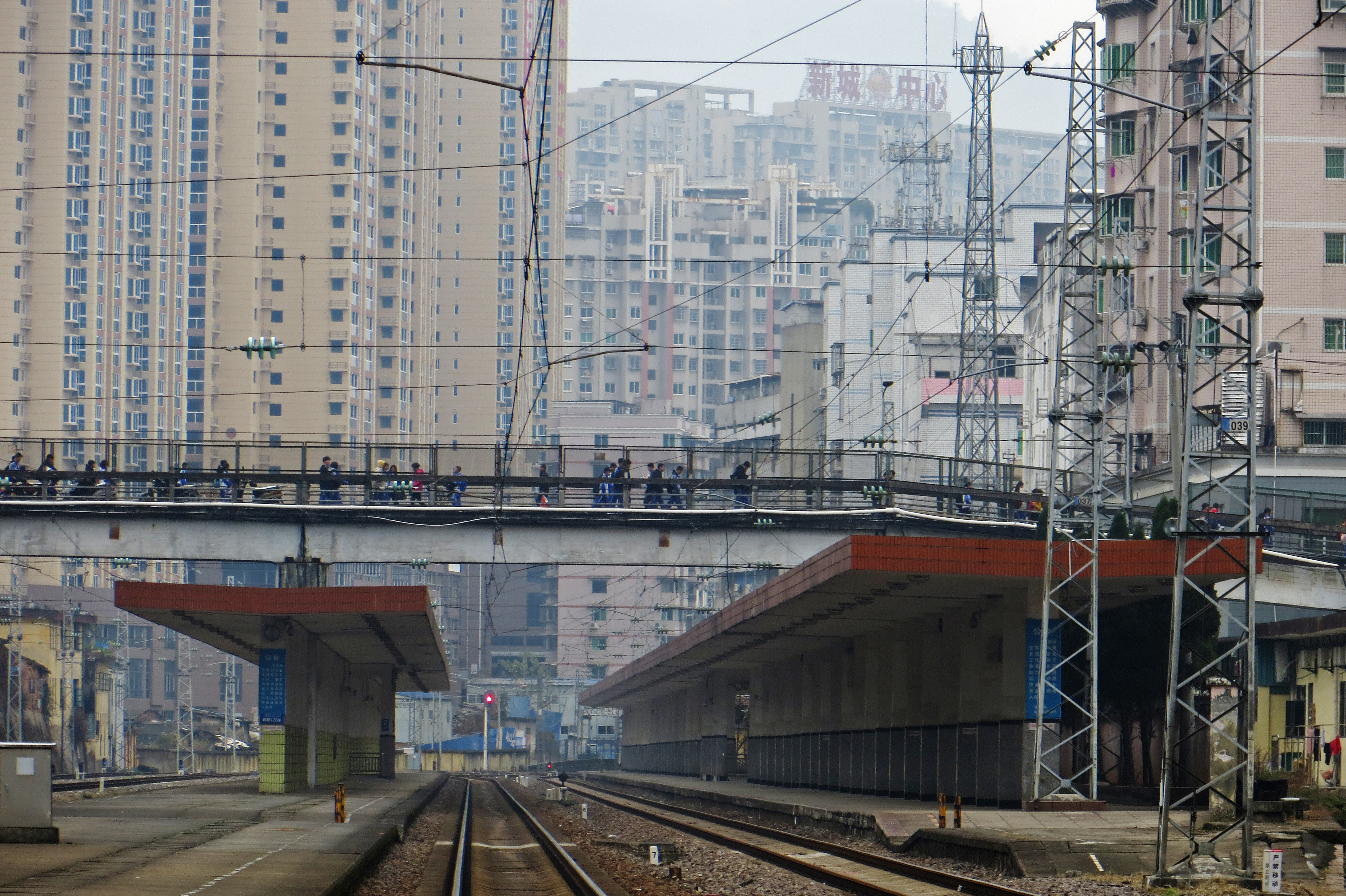 中文（中国大陆）: 水南站，原南平站。